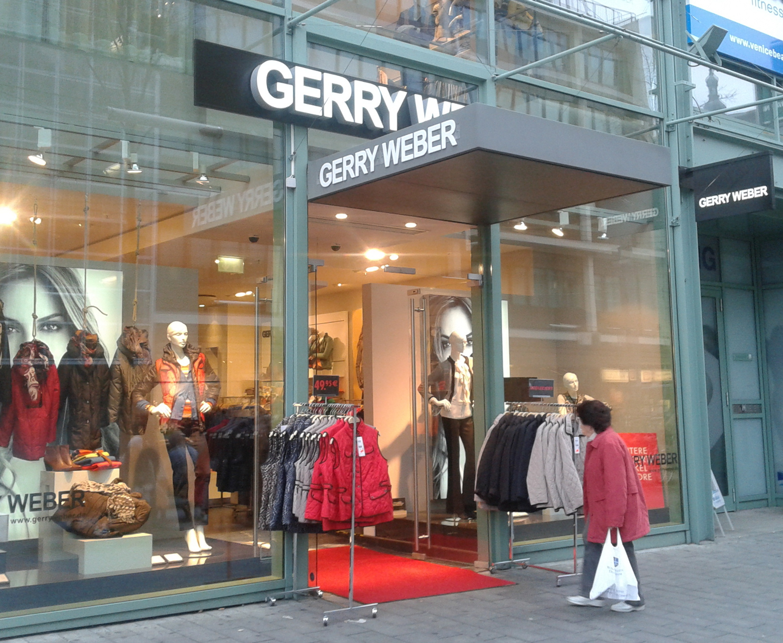 Gerry Weber in Mannheim, E1, an der Breiten Straße